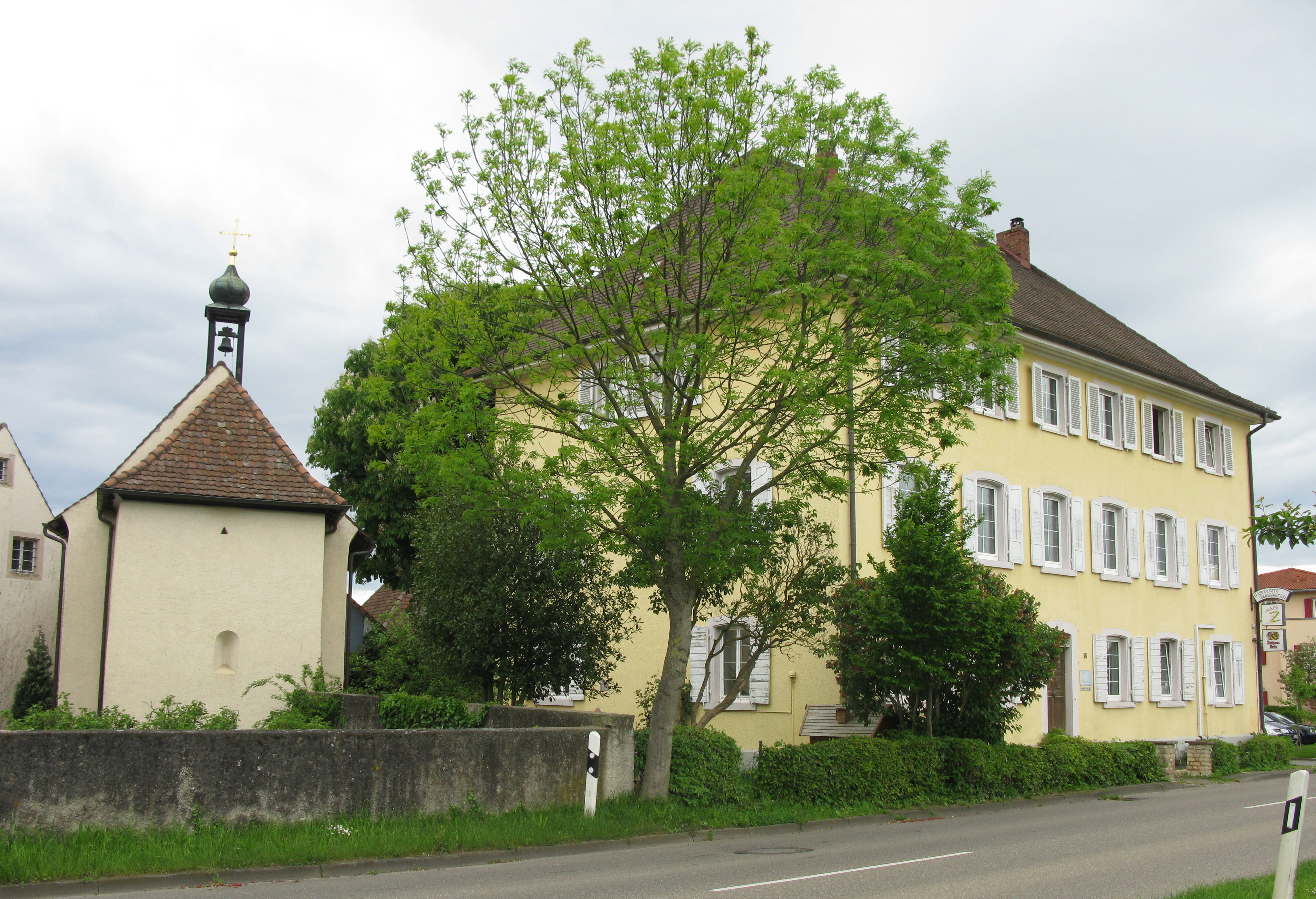 Glöcklehofkapelle mit Café Z